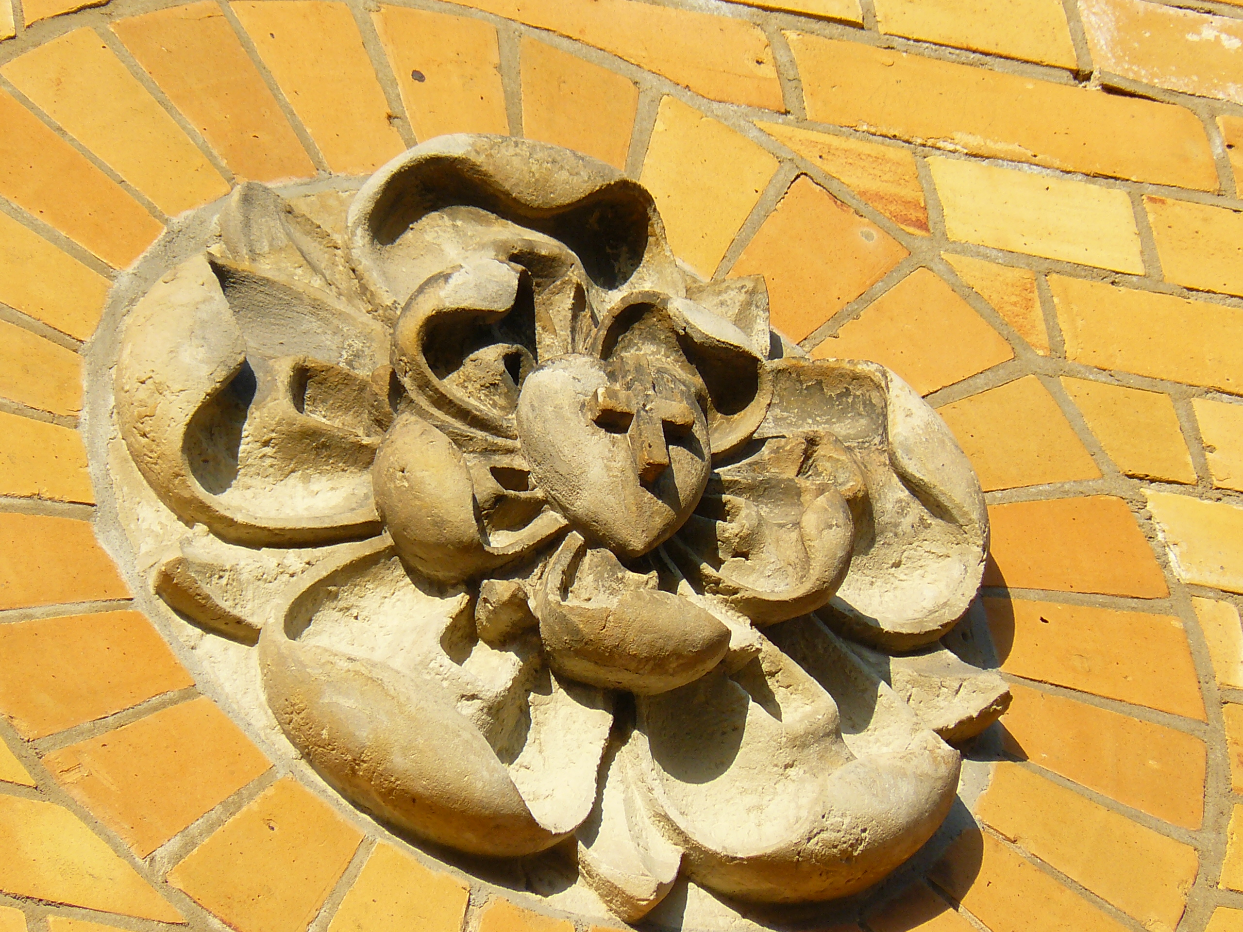 Turm der neogotischen Friedenskirche in Leipzig Gohlis; Lutherrose